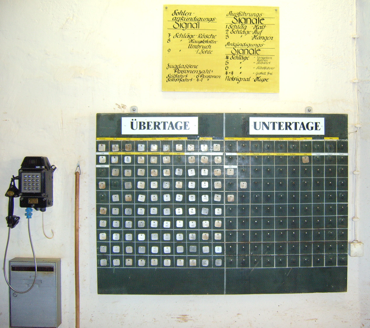 Ein Markenbrett dient auf Bergwerken zur Übersicht über die in den Schacht Eingefahrenen. Wer in den Schacht einfährt resp. ausgefahren ist, hängt seine Kontollmarke auf die entsprechende Seite des Markenbretts. Zumeist erledigt dies der Anschläger bzw. eine Aufsichtsperson.